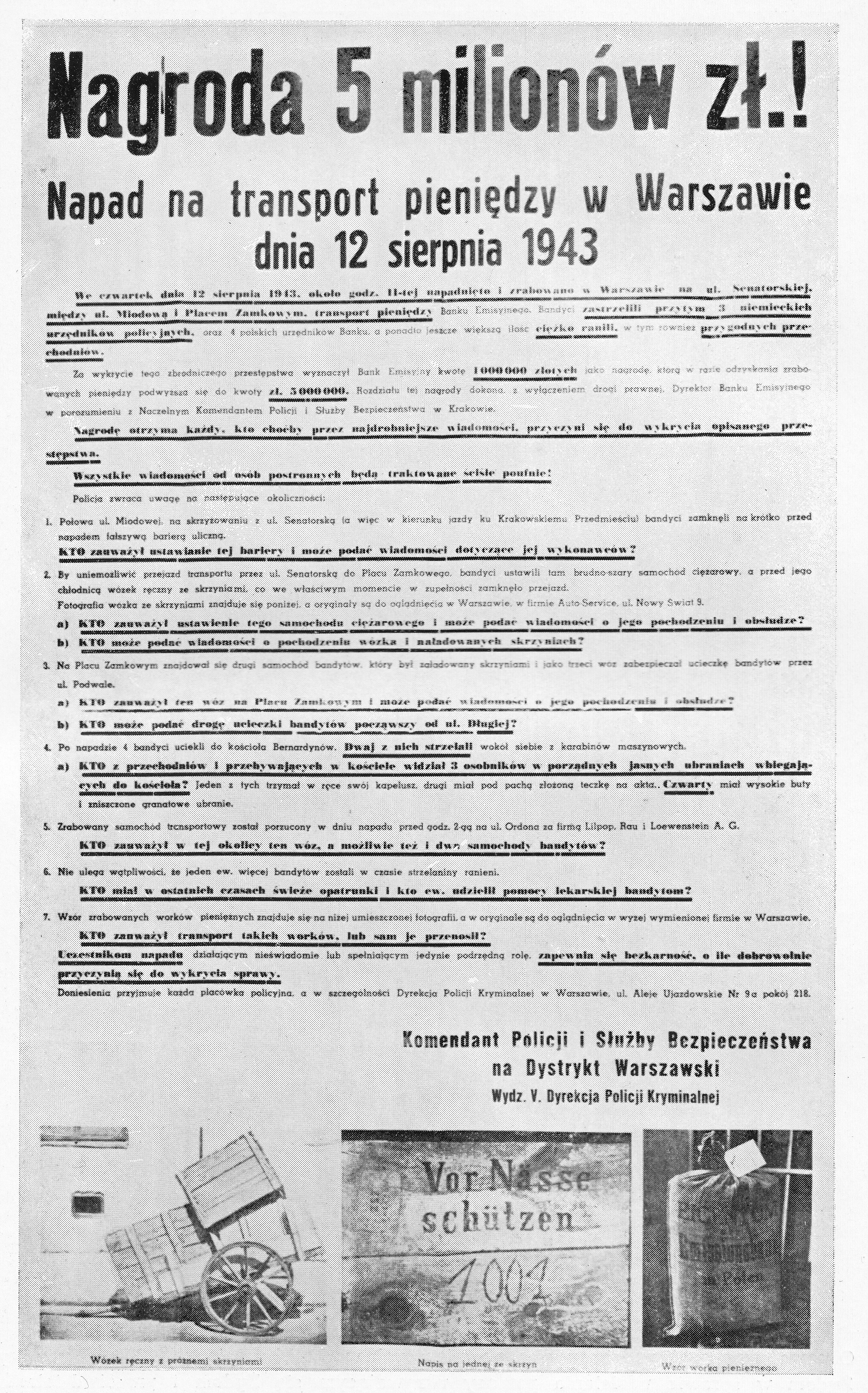 Ogłoszenie o nagrodzie za wskazanie uczestników akcji Góral